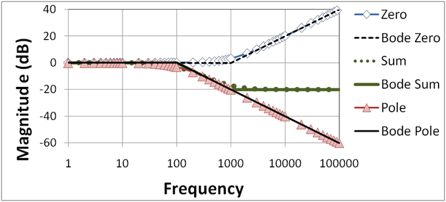 Bode pole-zero plot